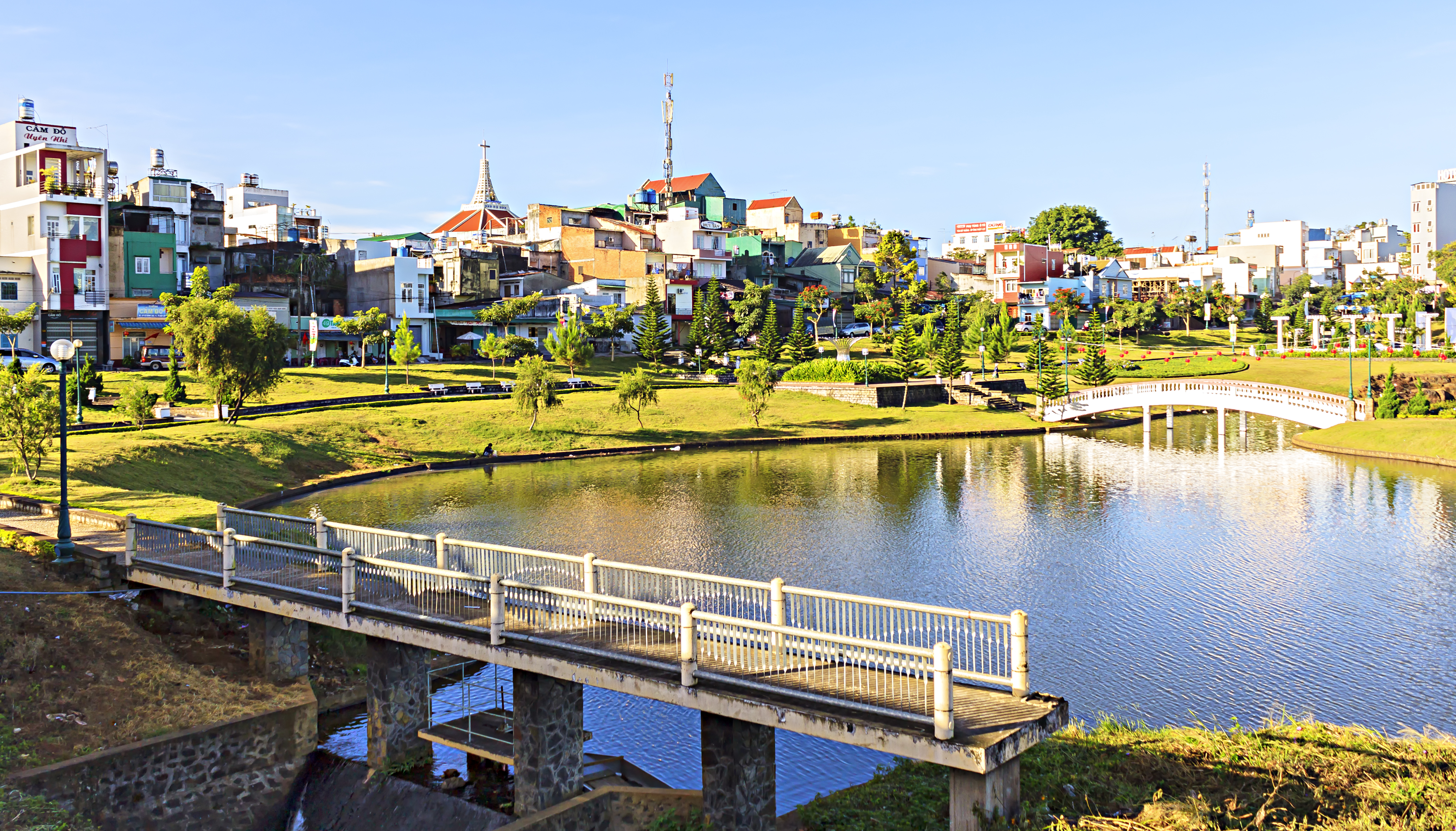 Một góc công viên ở thành phố Bảo Lộc thuộc tỉnh Lâm Đồng, Việt Nam.